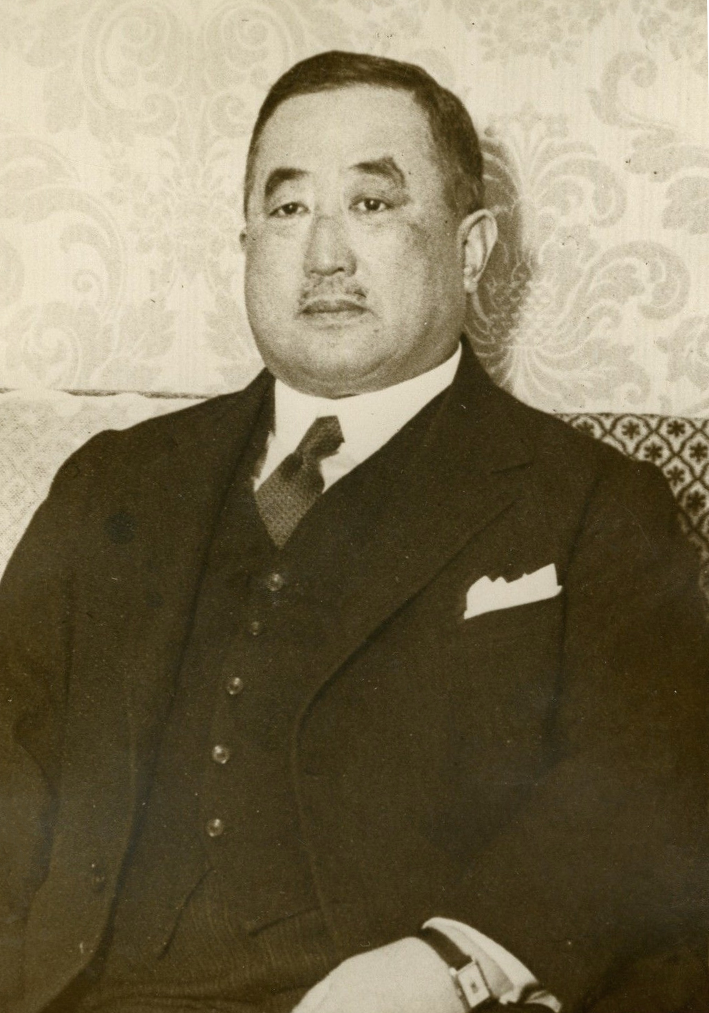 "Mr MATSUDAIRA Ambassadeur du JAPON 1932" Photo originale G.DEVRED (Agce ROL)